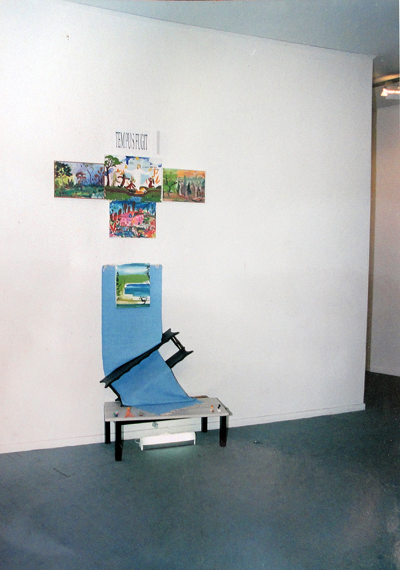 Ricardo Frantz: Tempus fugit, instalação 1998, exposição coletiva Remetente, Espaço Cultural ULBRA